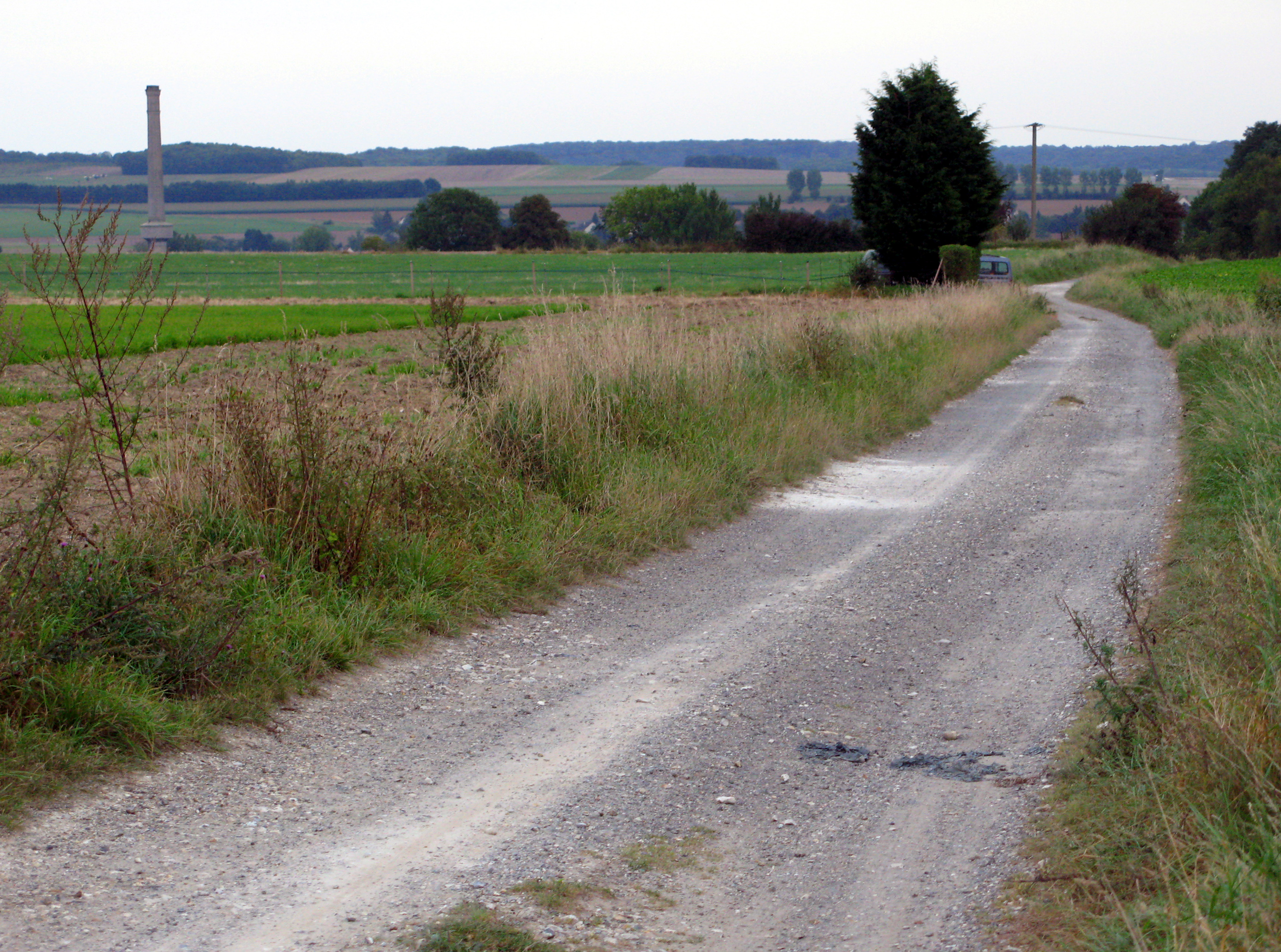 Saint-Ouen (Somme, France) - L'ancienne voie romaine, appelée «Chaussée Brunehaut», descend de Surcamps vers Saint-Ouen. On remarque bien la verdure de la vallée de la Nièvre.